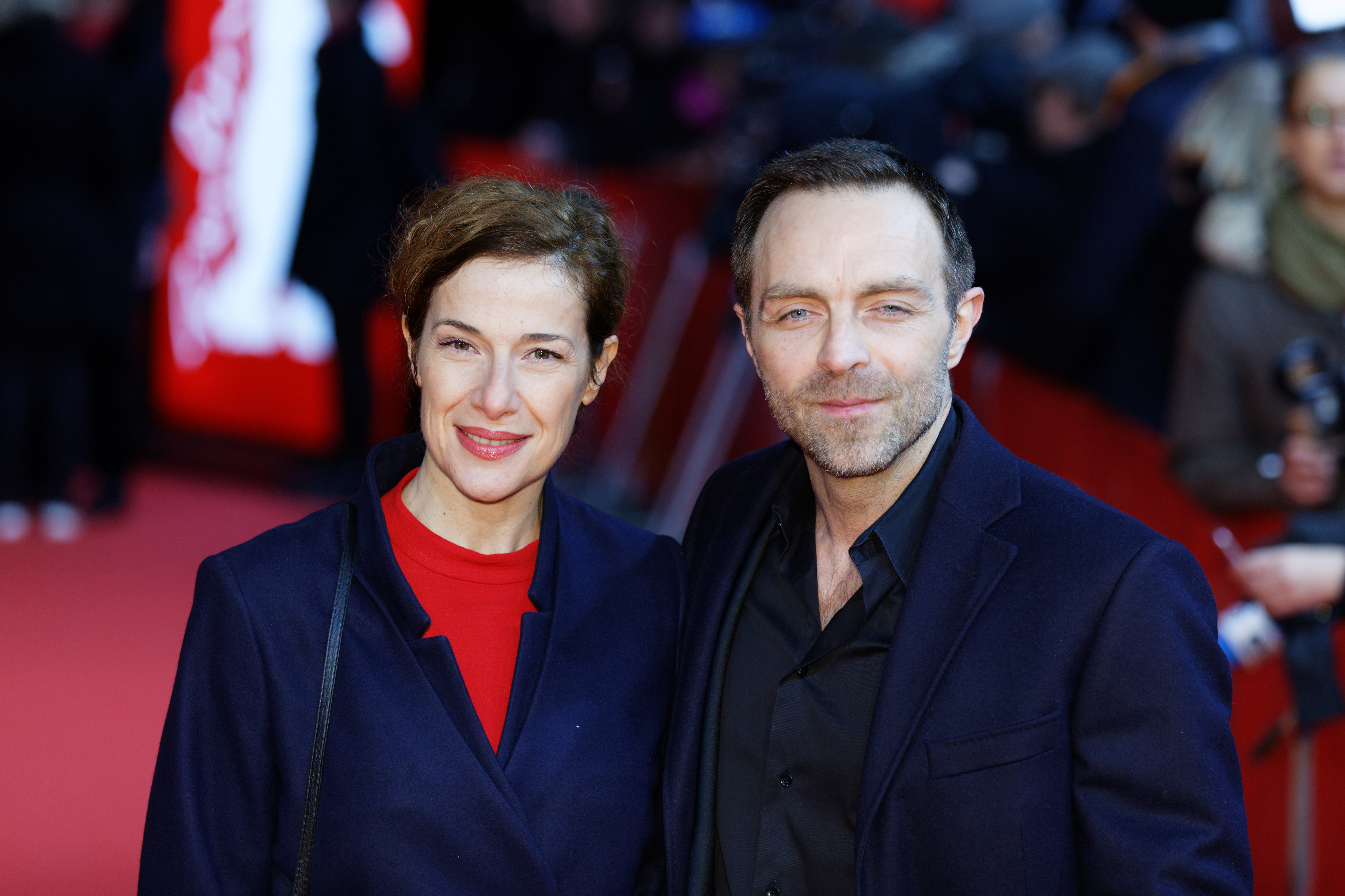 Aleksandar Jovanovic, daneben seine Frau Clelia Sarto bei der Premiere von Die versunkene Stadt Z bei der Berlinale 2017